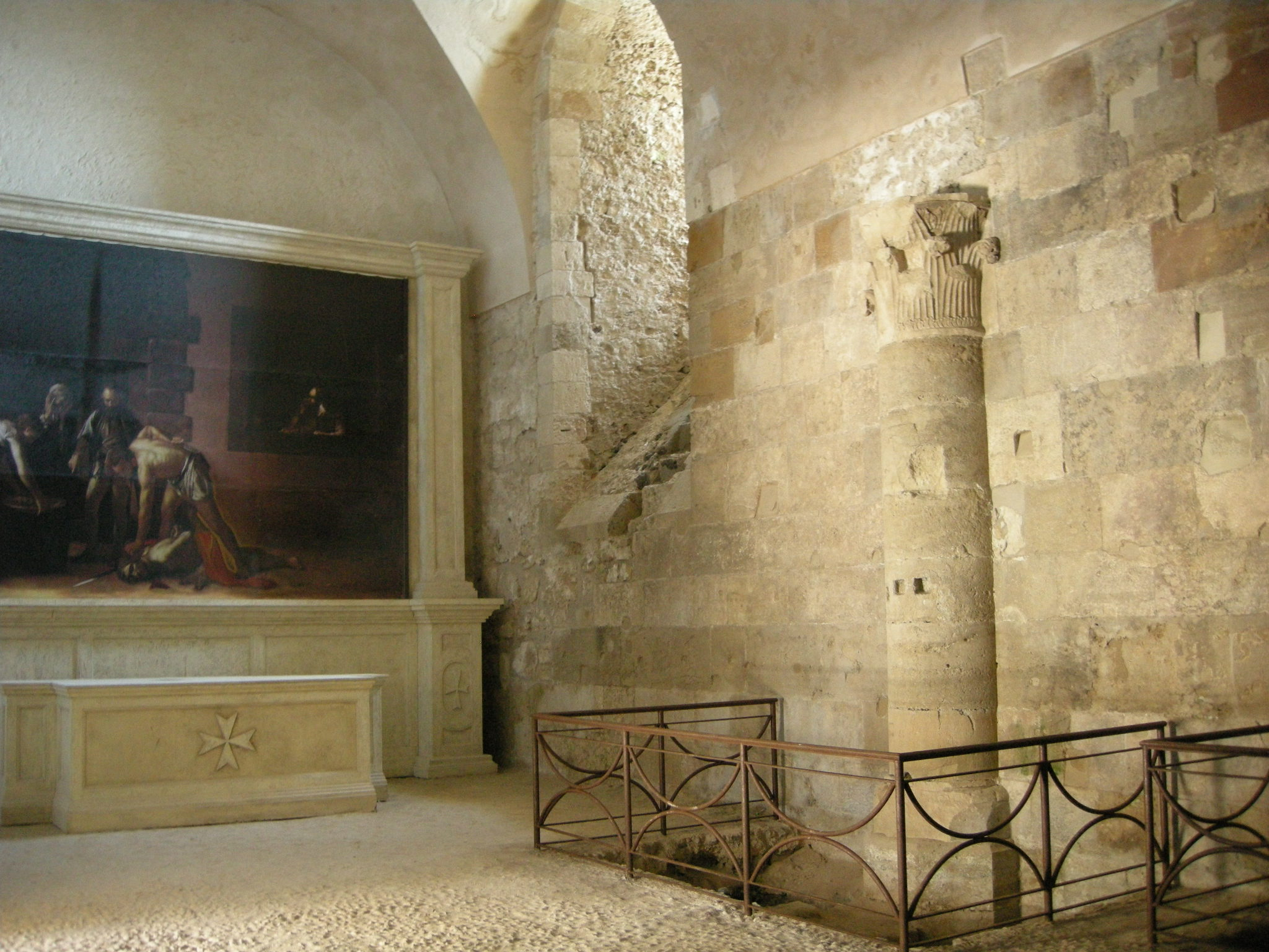 Ortigia, castello maniace, interno, sala caravaggio